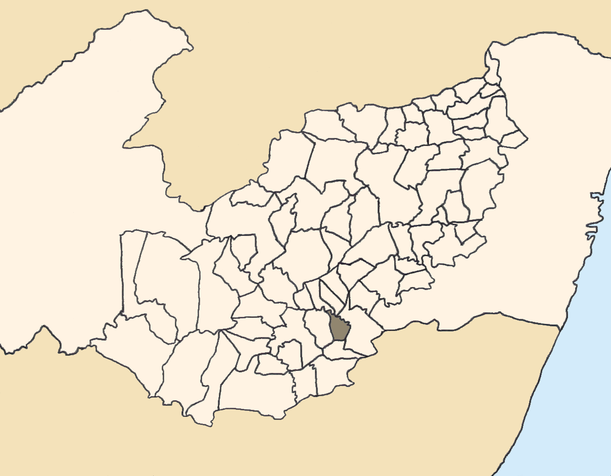 Mapa da mesorregião Agreste de Pernambuco (Brasil) subdivida em municípios. Em destaque, o município de Angelim. Map of the brazilian state of Pernambuco (mesorregião Agreste) showing the city of Angelim. Imagem tratada com o GIMP. Image made with GIMP.